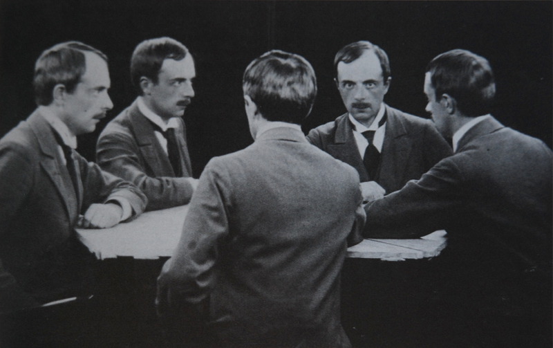 Autoportret wielokrotny Wacława Szpakowskiego, wykonany w 1912 roku